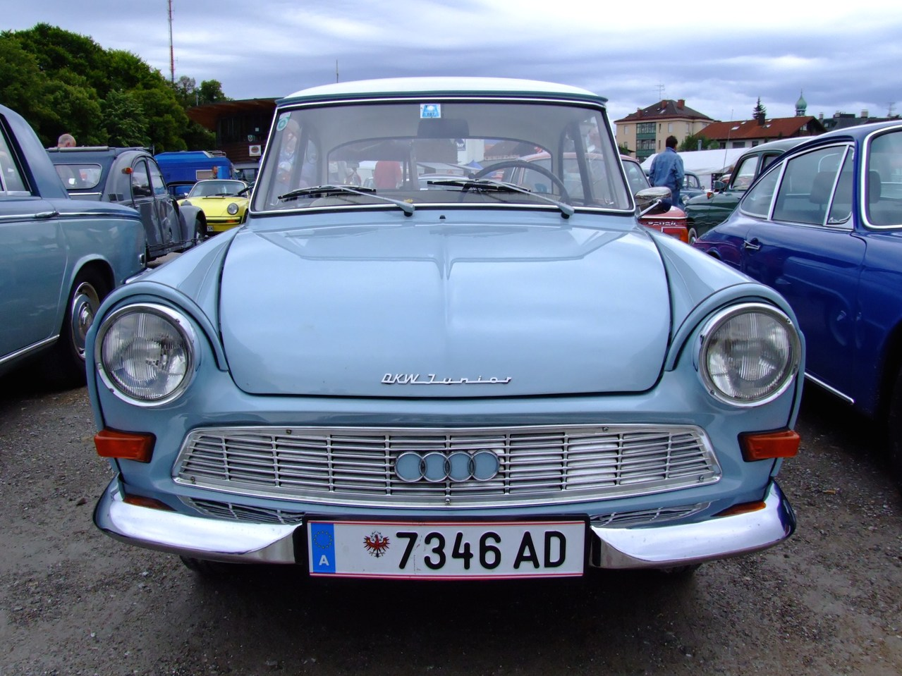 Quelle: selbst fotografiert, 07/2007 Fotograf: Späth Chr.